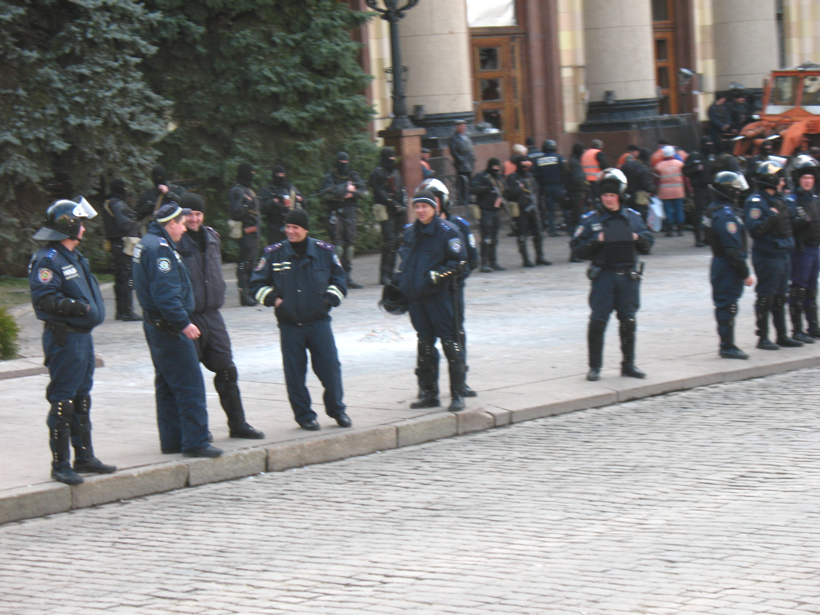 ХОГА сразу после штурма